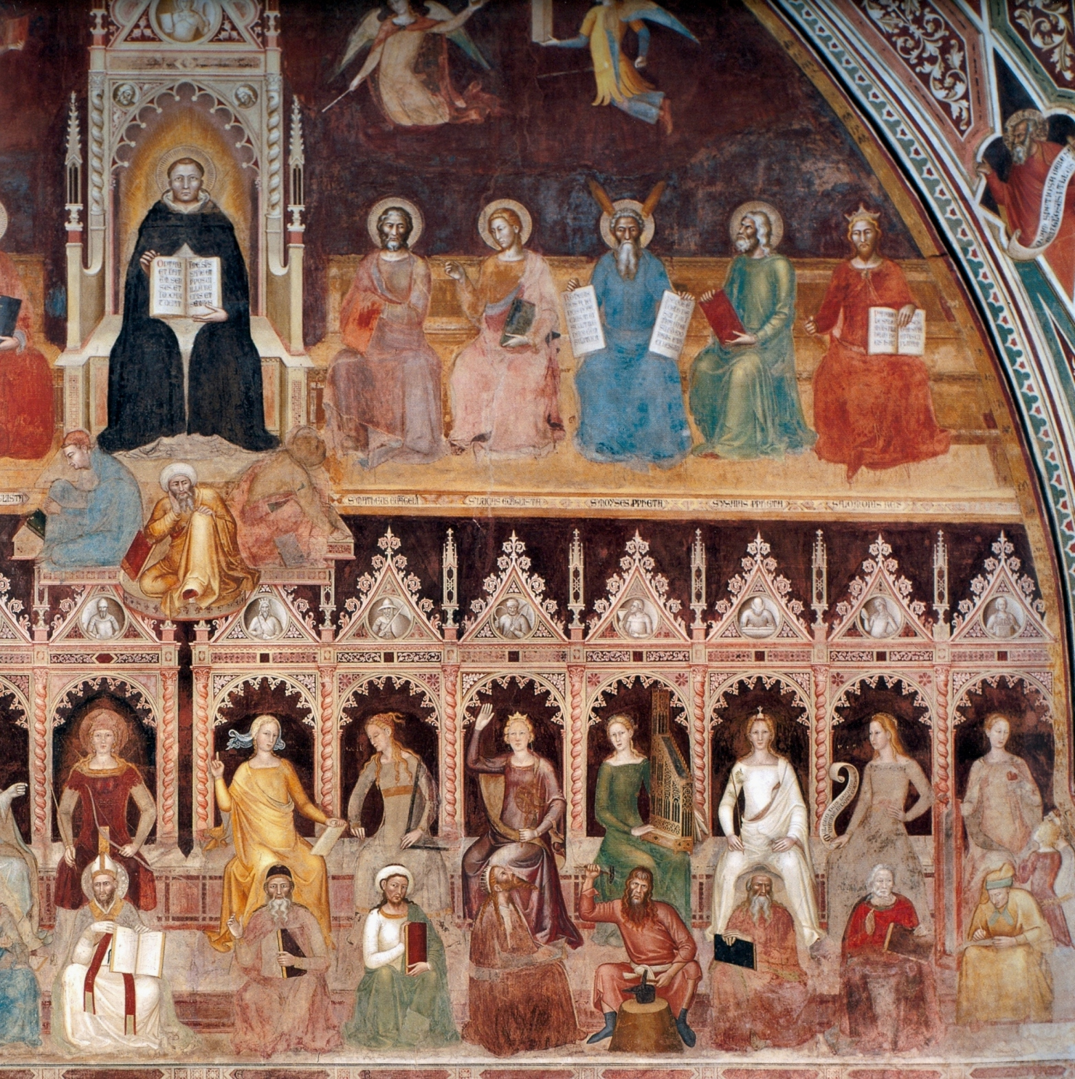 Andrea_di_Bonaiuto._Santa_Maria_Novella_1366-7_fresco_0016